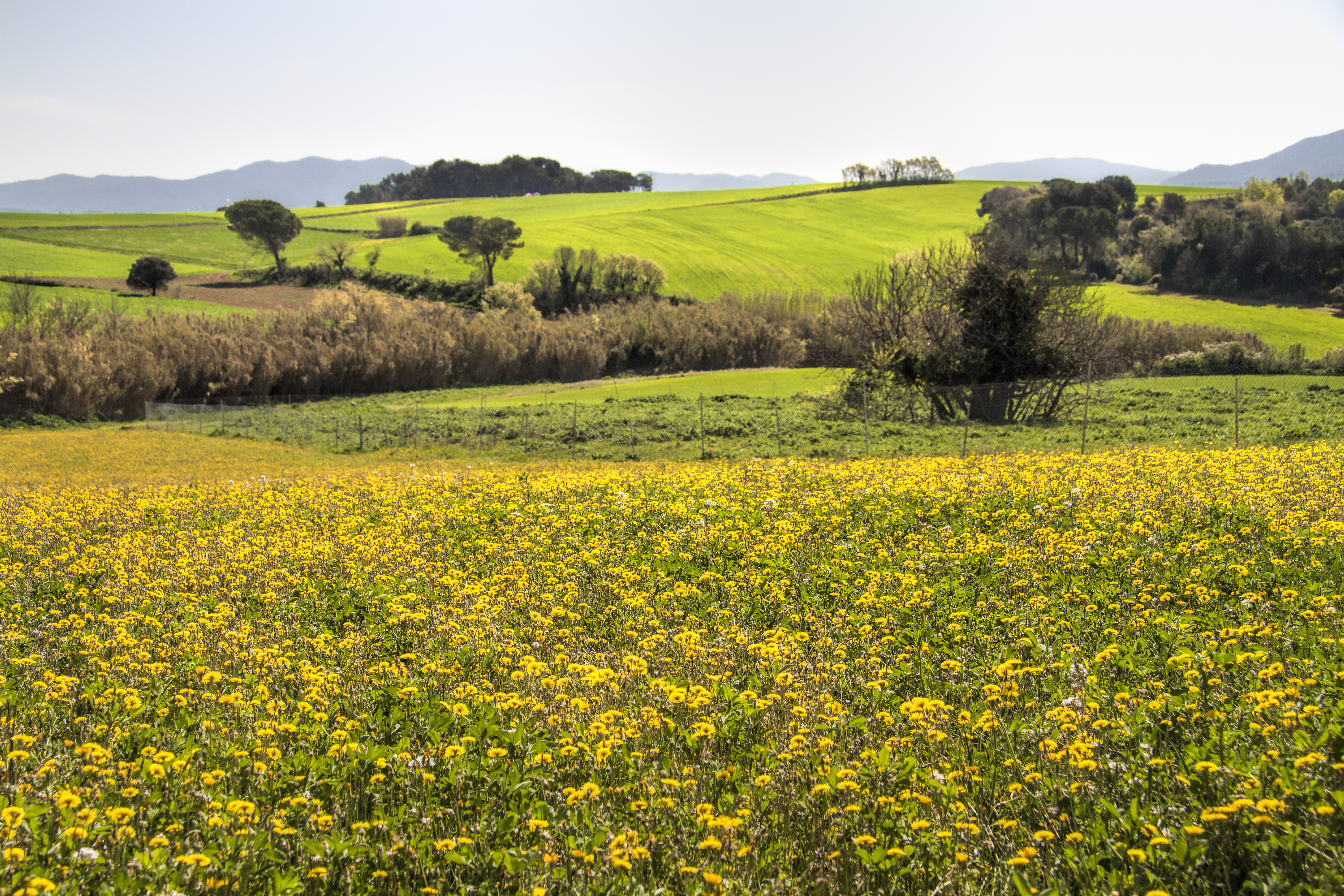 Espai rural de Gallecs This is a a photo of a natural area in Catalonia, Spain, with id: ES510277